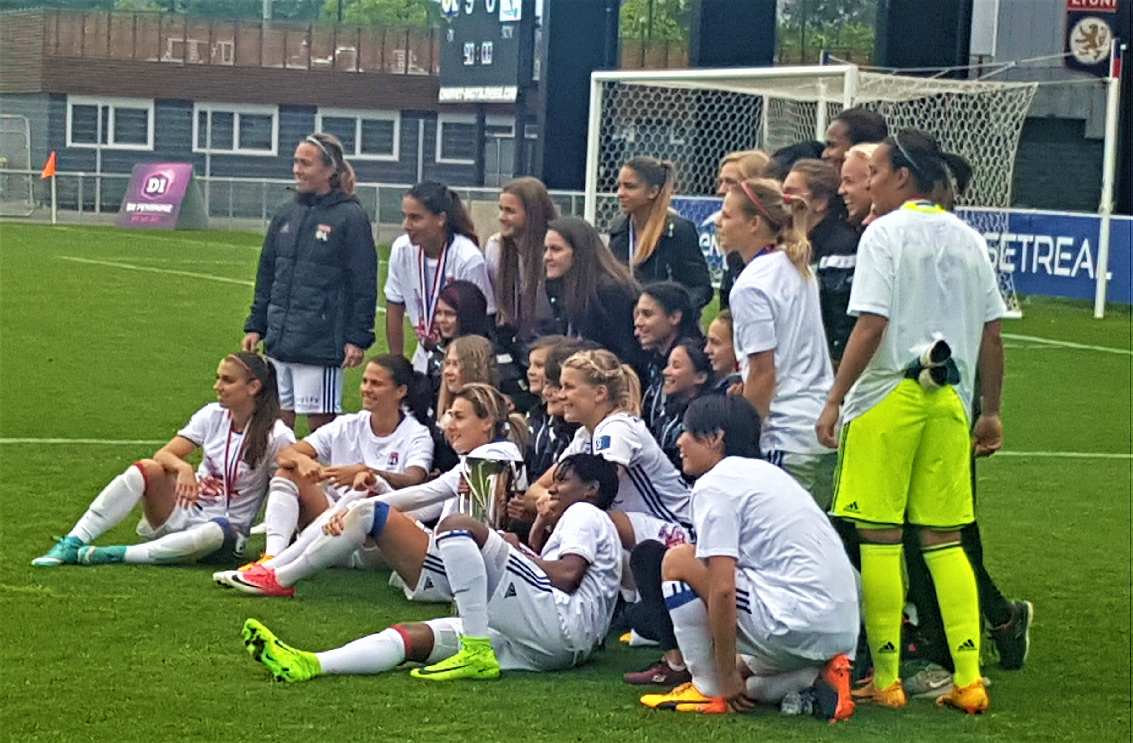 Effectif de l'Olympique lyonnais féminin lors de la célébration du Titre 2016-2017, lors de la victoire 9-0 contre Soyaux à la 20ème journée.